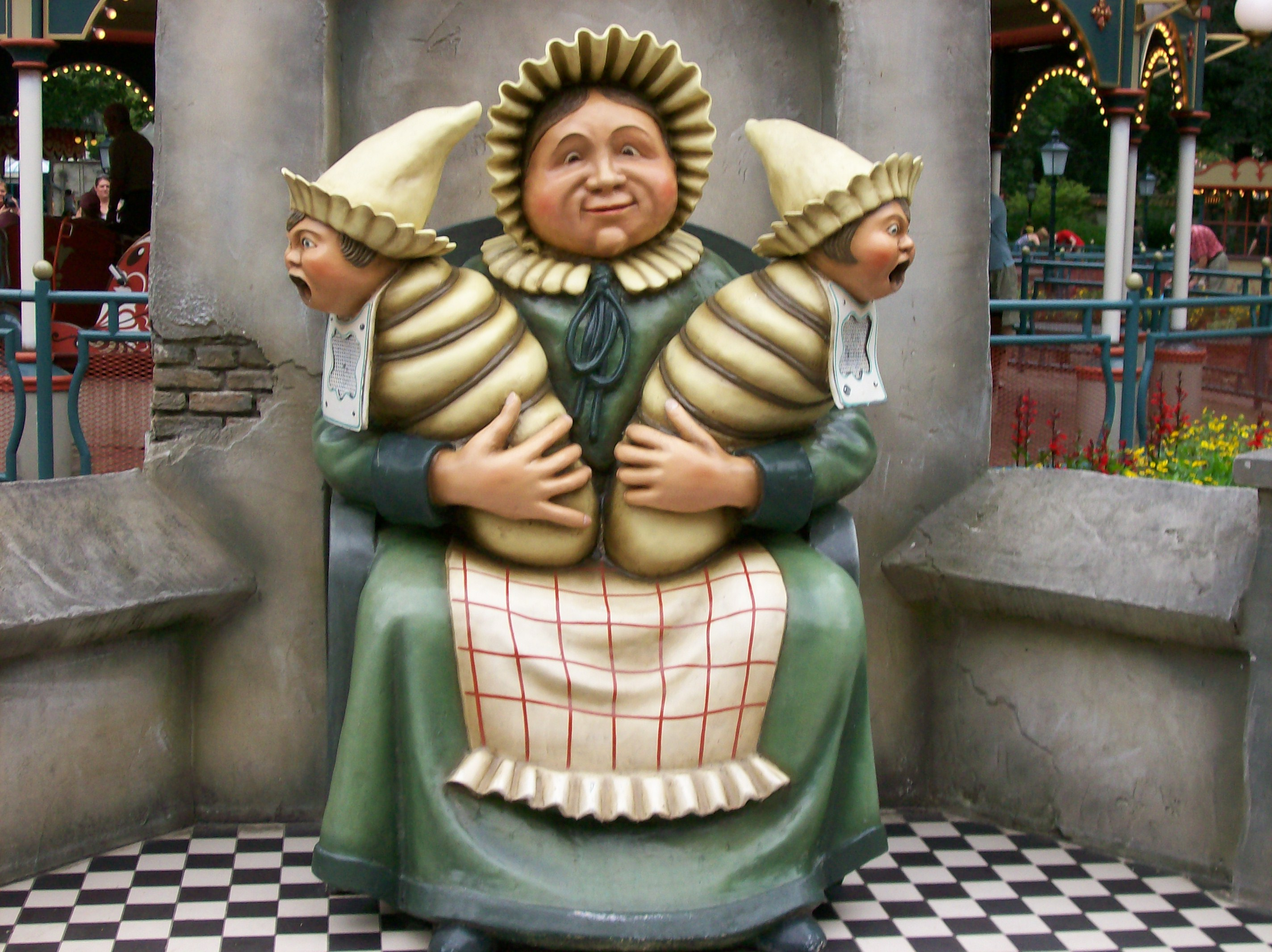 La poubelle Moeder Gijs sur la place Anton Pieck à Efteling